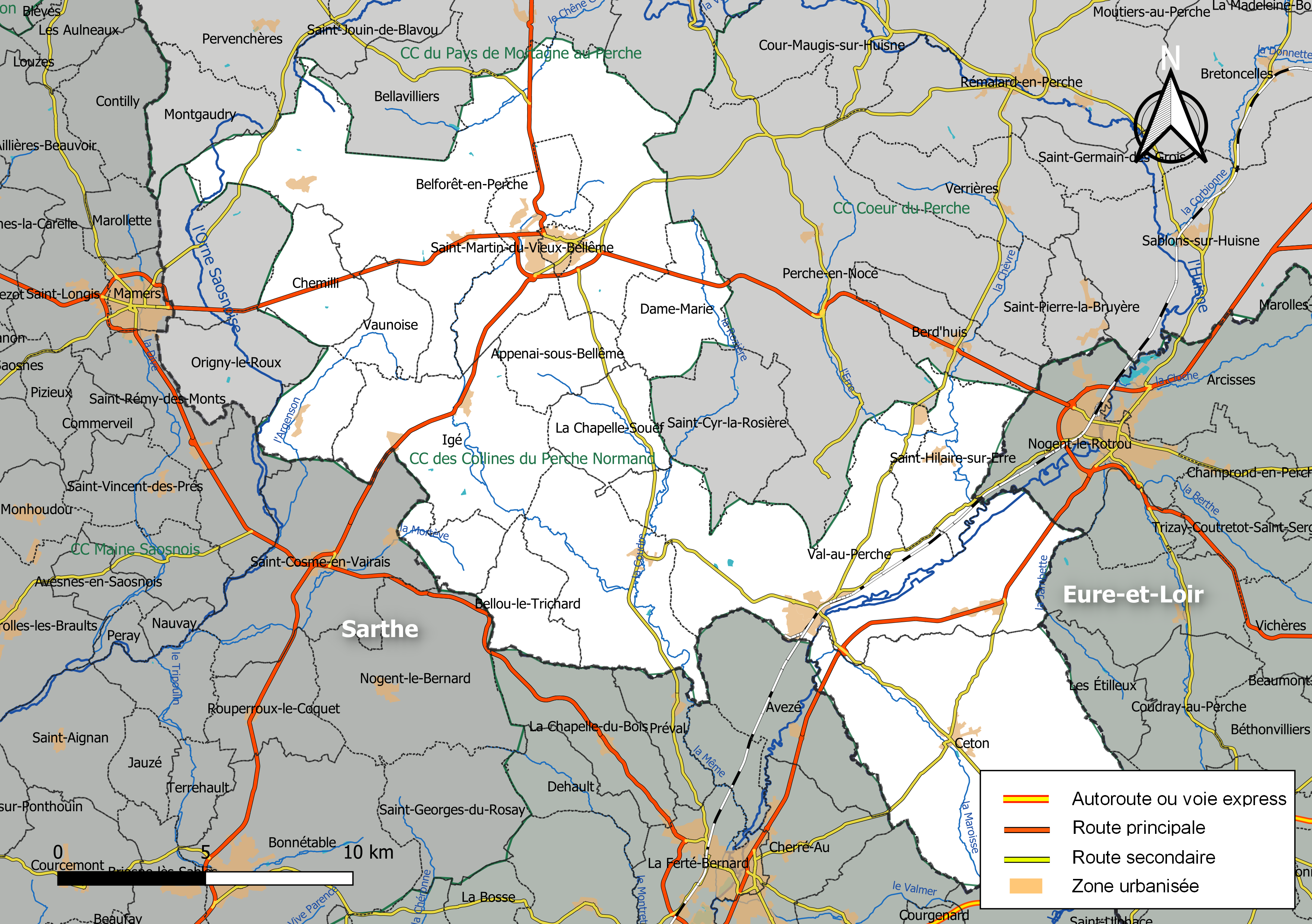 Carte géographique de la Communauté de communes des Collines du Perche Normand, département de l'Orne, France. Composition au 1er janvier 2019.